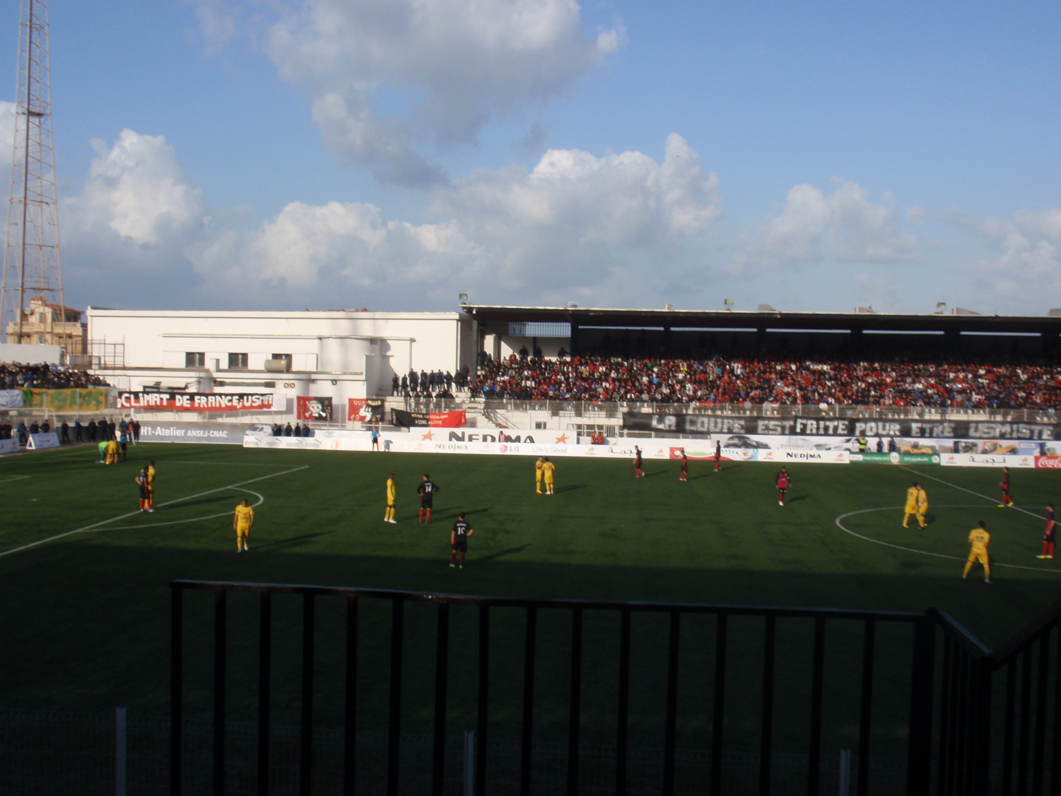 Match USM Alger - JS Kabylie, comptant pour les 8e de finale de la Coupe d'Algérie de football 2011-2012.